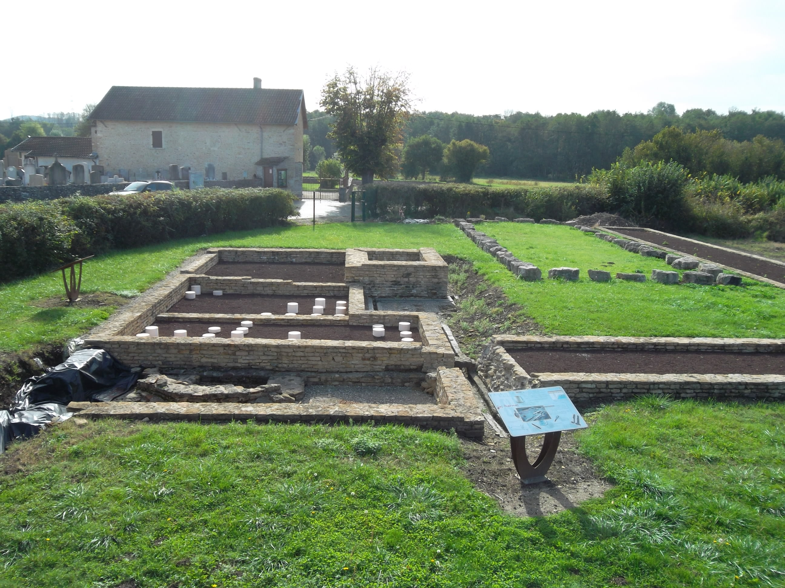 Villa gallo-romaine (vestiges) de Saint-Romain-de-Jalionas.